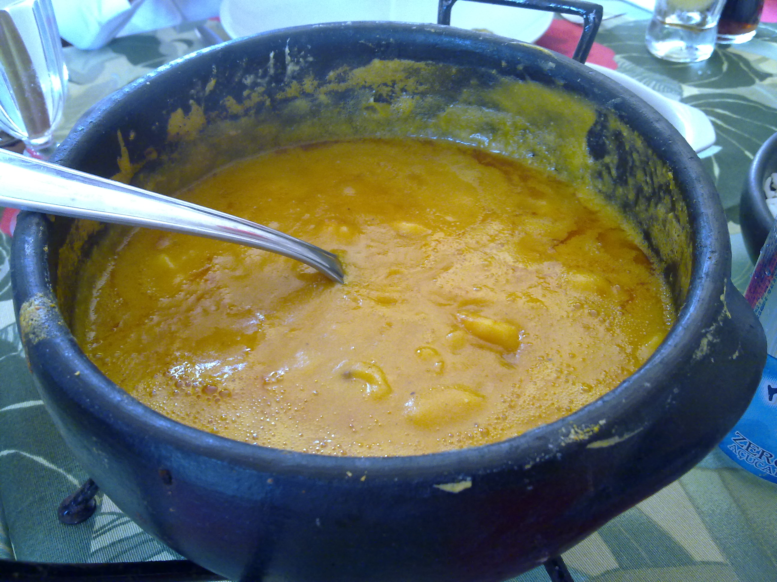 Bobó de camarão do restaurante Iaiá Bistrô, de Porto Alegre. Fica na rua Chavantes, 636, Vila Assunção.